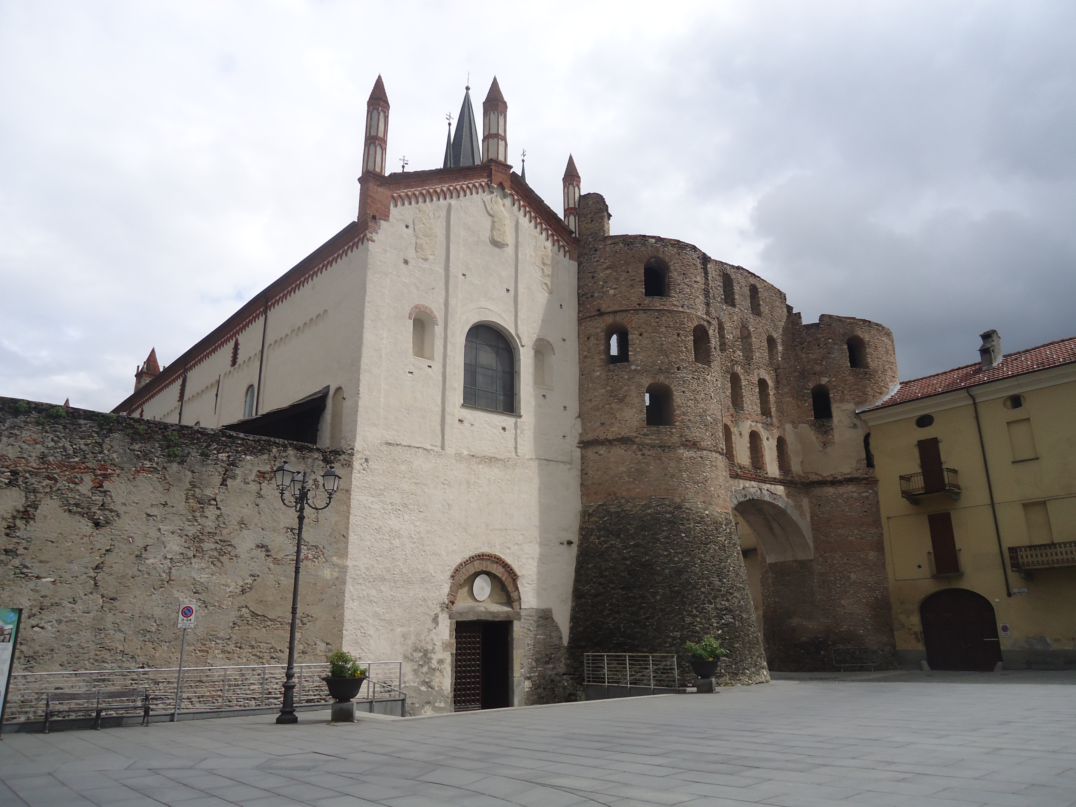 La medievale Cattedrale San Giusto a Susa (TO) e la tardo-antica Porta Savoia